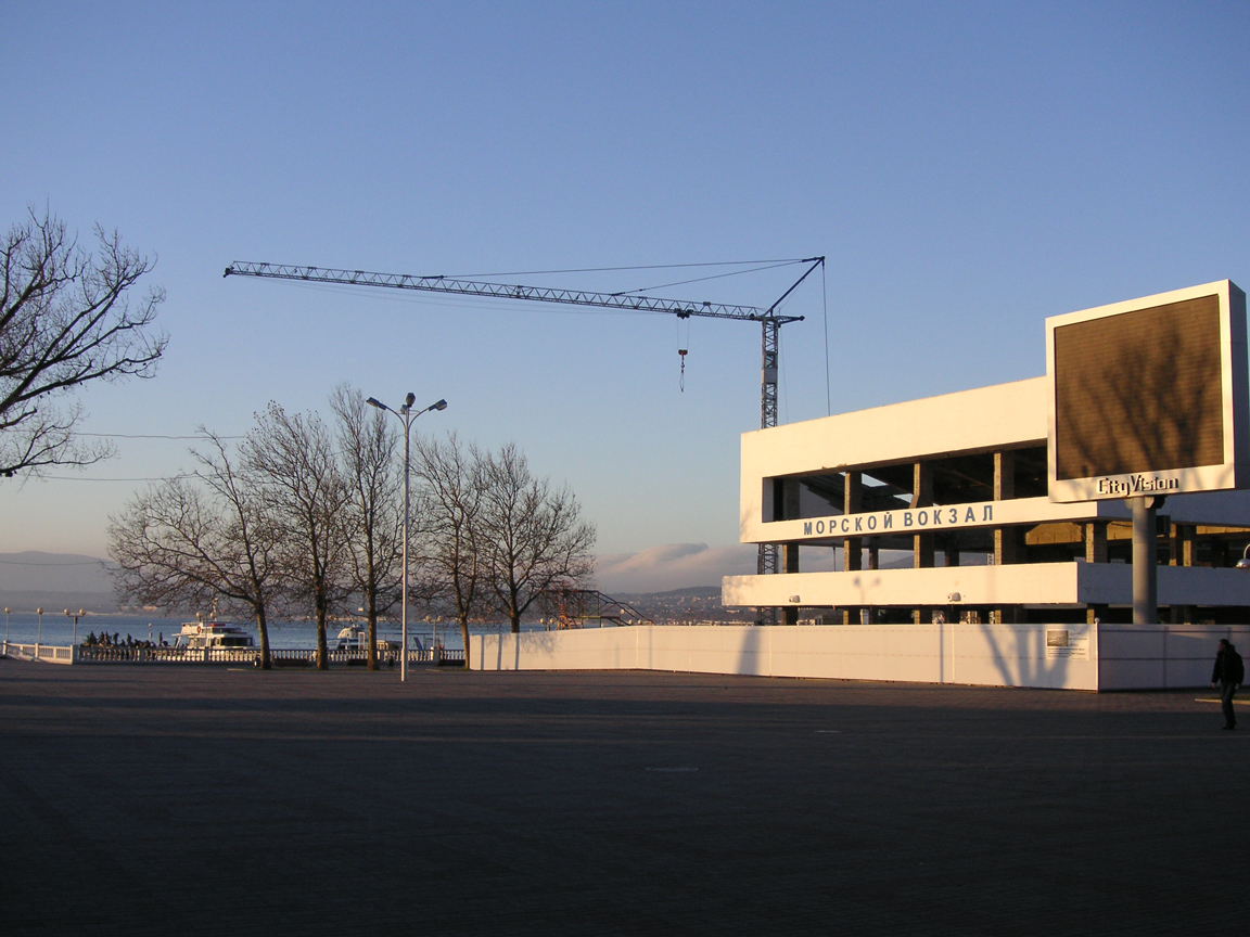 Внешний вид геленджикского морского вокзала во время его перестройки. Все перекрытия снесены, и башенный кран рядом стоит.